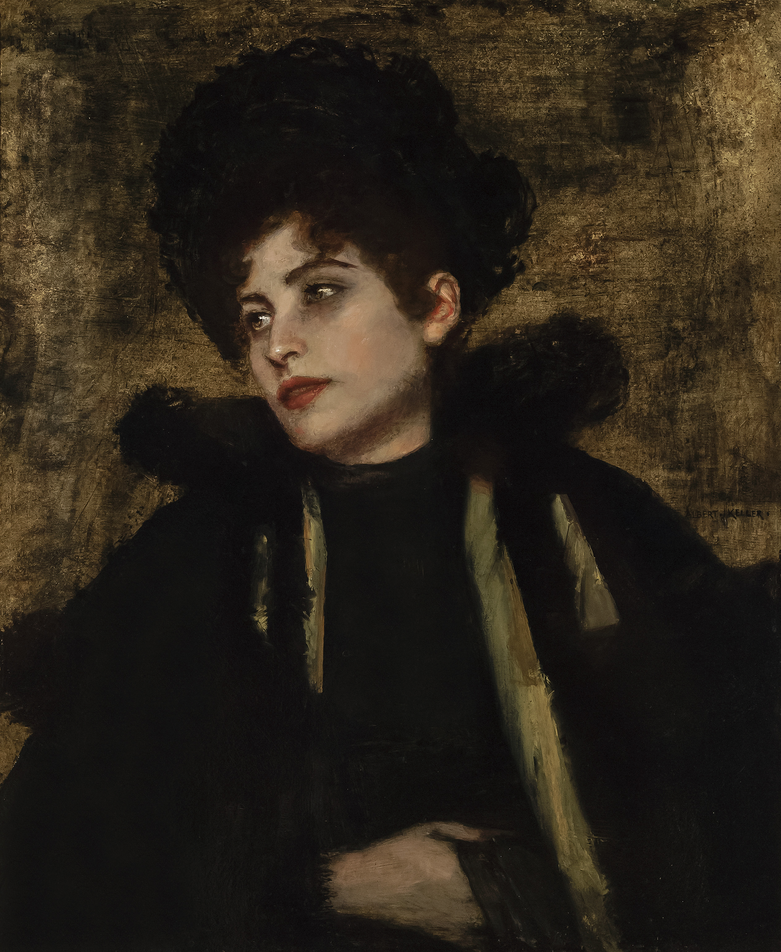 Porträt der Lily Disgeistes von Albert von Keller, Öl auf Malkarton, 66 x 54 cm, Rechts mittig signiert